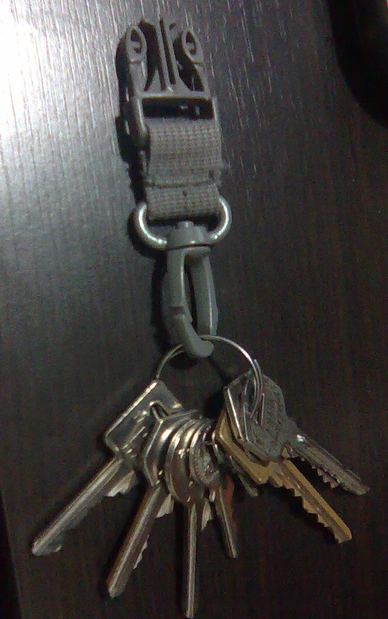 Conunto de llaves con un llavero para una mochila.